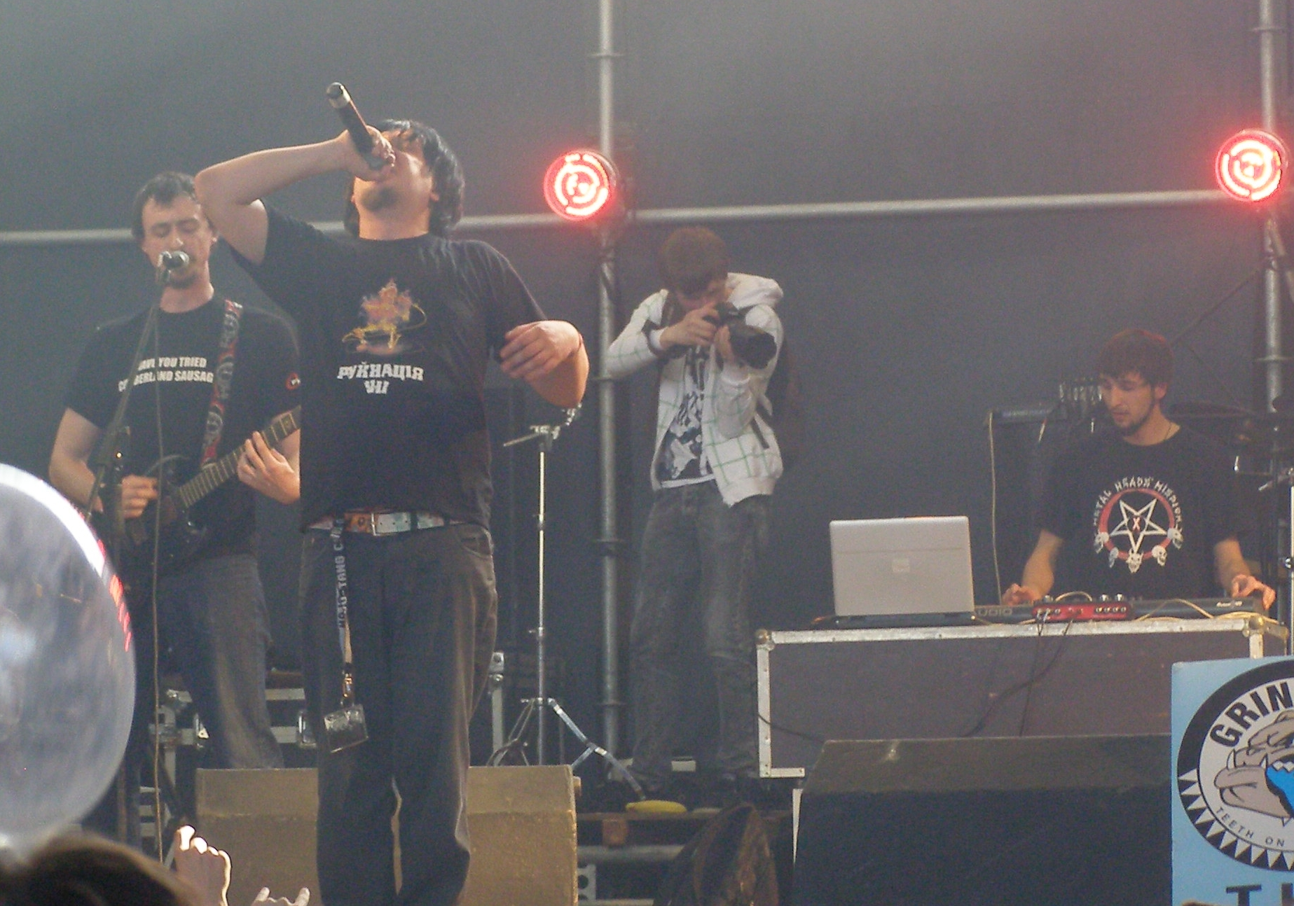 Wiktor Nowosiolow (mit Mikrofon) - Gründer des Festivals "Руйнація" (Lwiw, Ukraine)